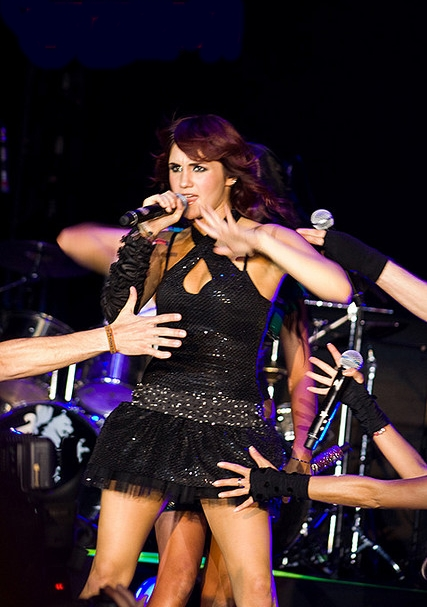 Dulce María durante um show em 2008.